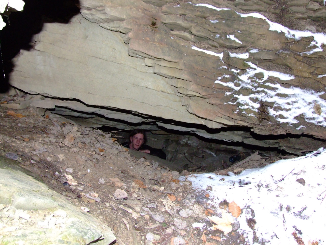 Jaskinia Zimna Dziura (Beskid Wyspowy)